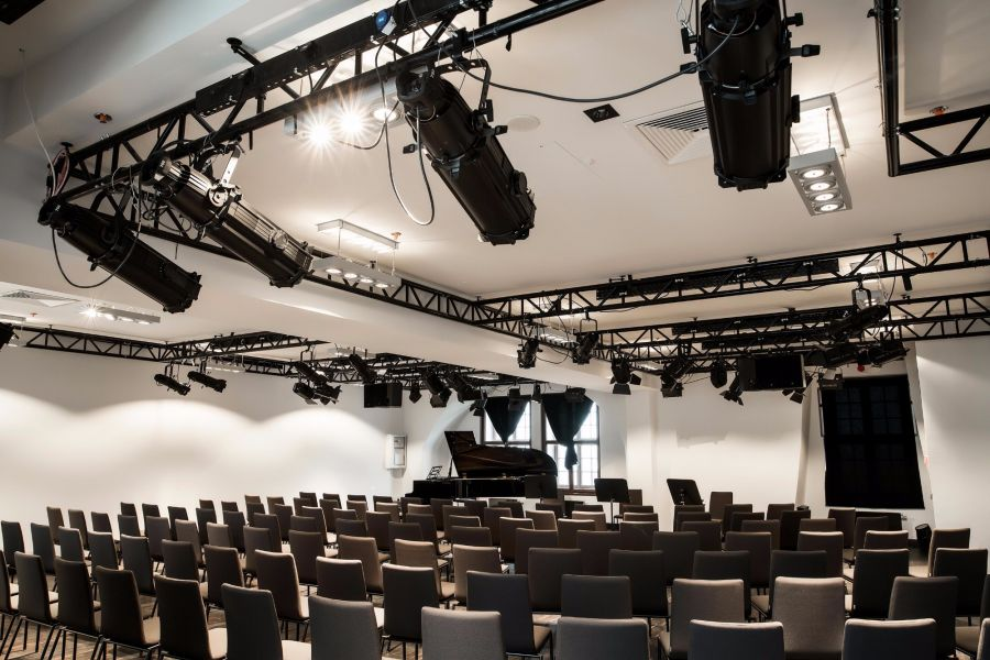 Sala Kameralna im. Jacka Nieżychowskiego w Operze na Zamku w Szczecinie